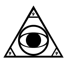 Предпологаемый опозновательный знак союза девяти , явился во сне неизвестному